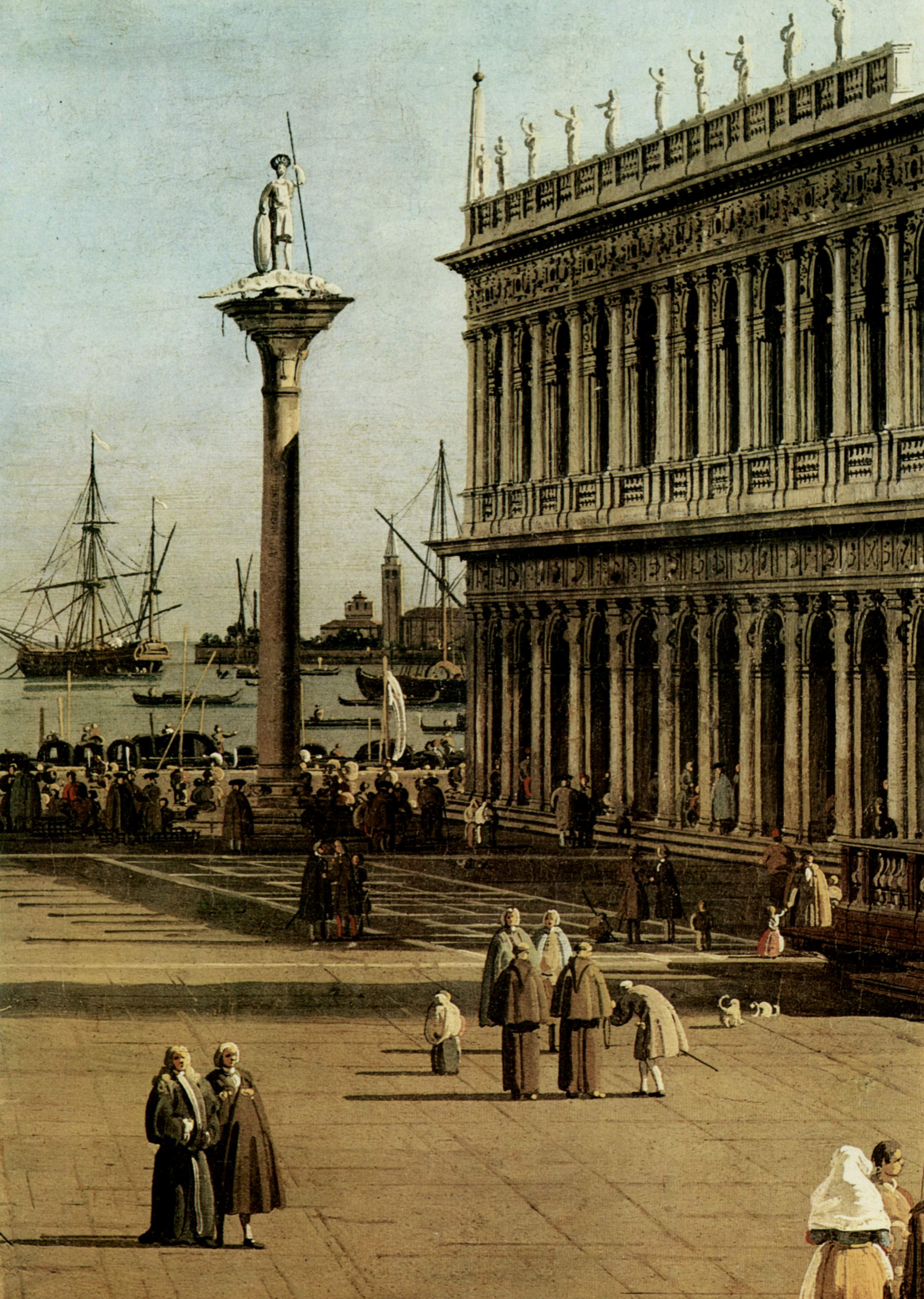 detail